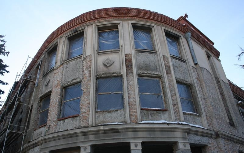 Ирон: Хуссар Ирыстоны парламенты хӕдзар ремонты рӕстӕджы